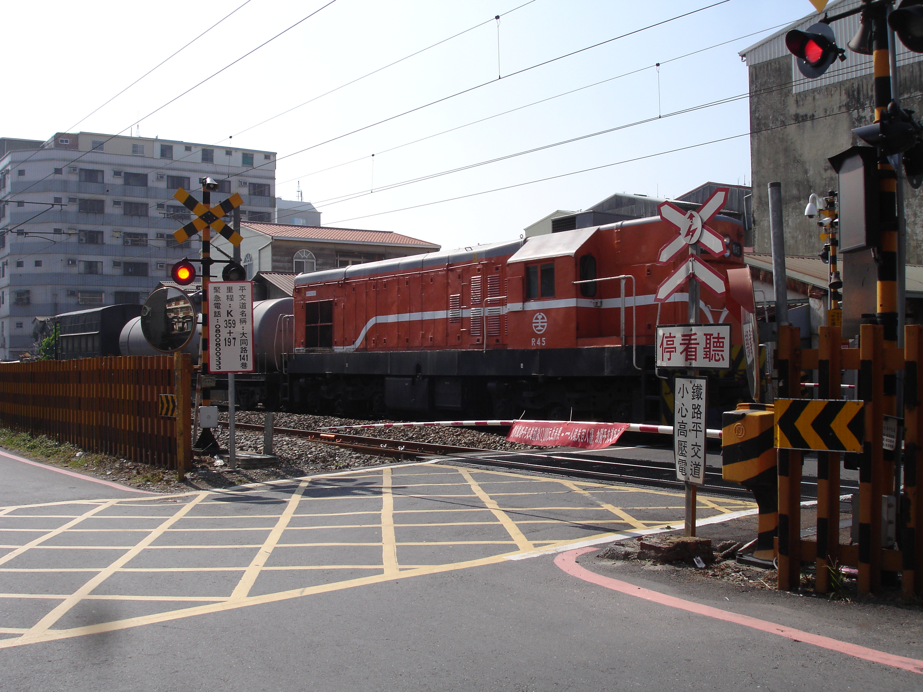 臺灣鐵路管理局柴電機車R45牽引貨運列車，通過臺南市仁德區大同路141巷平交道。